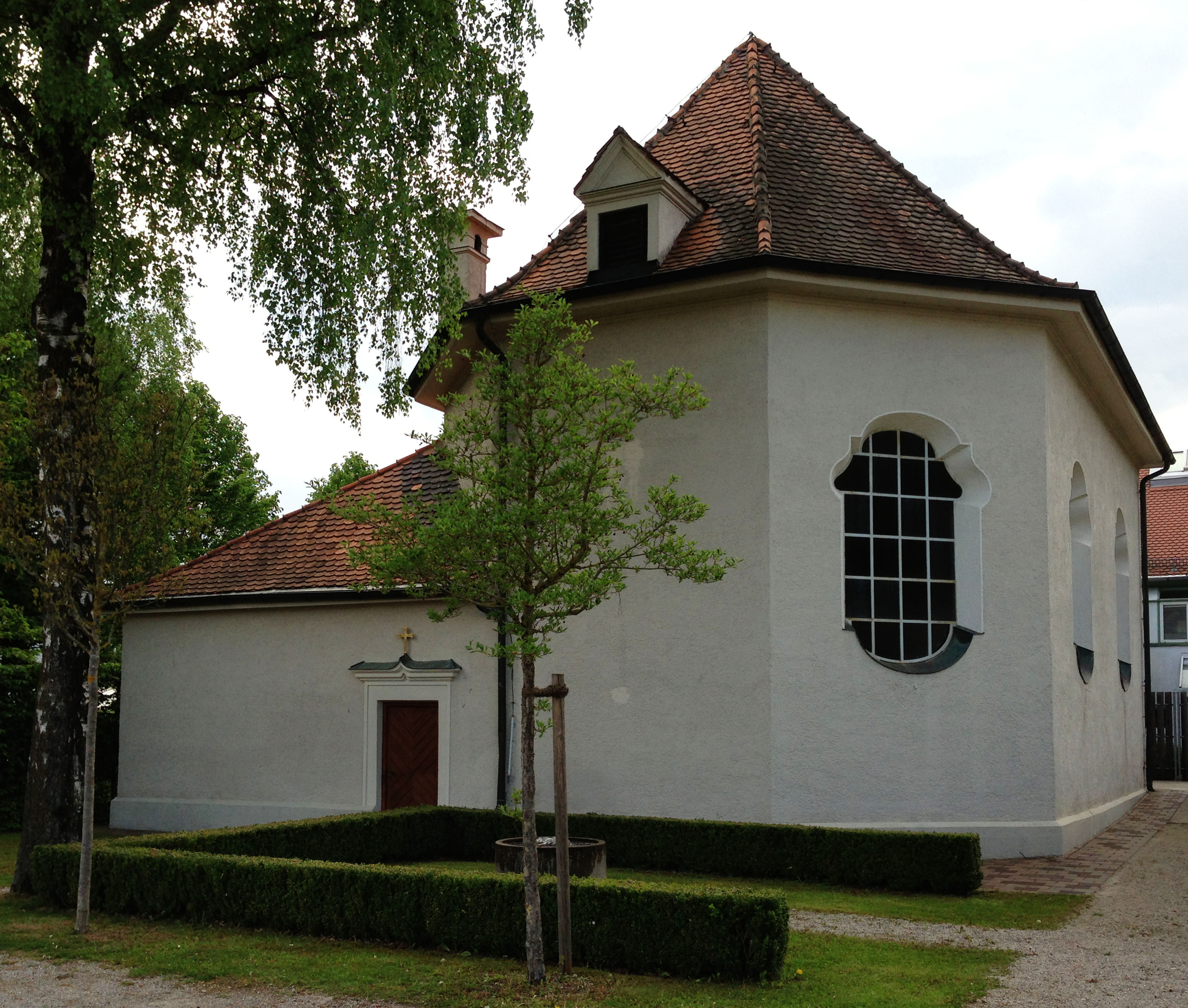 Am Blütenanger 64, München